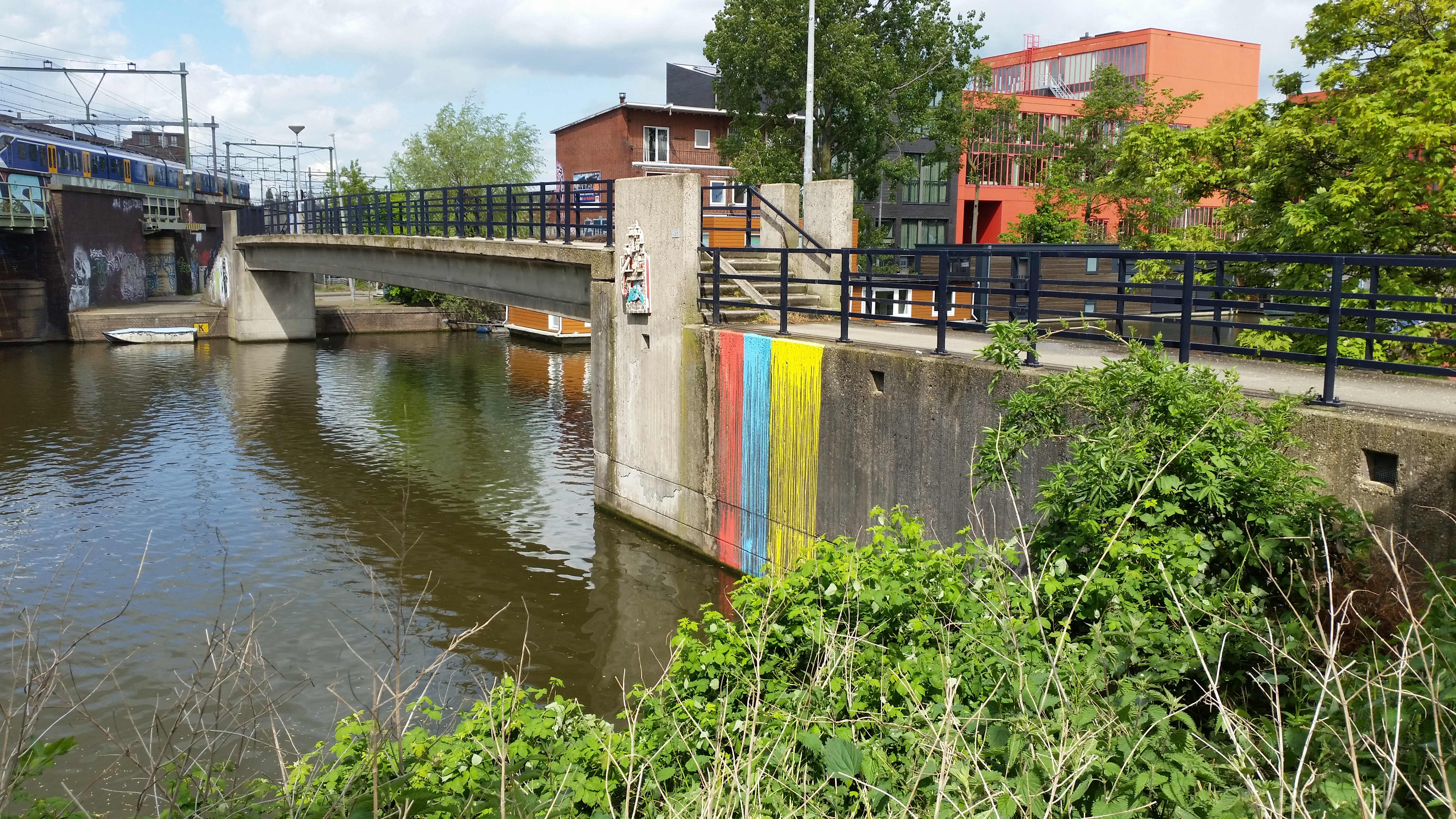 Impressie van voetbrug 328 over het Lozingskanaal, Amsterdam.